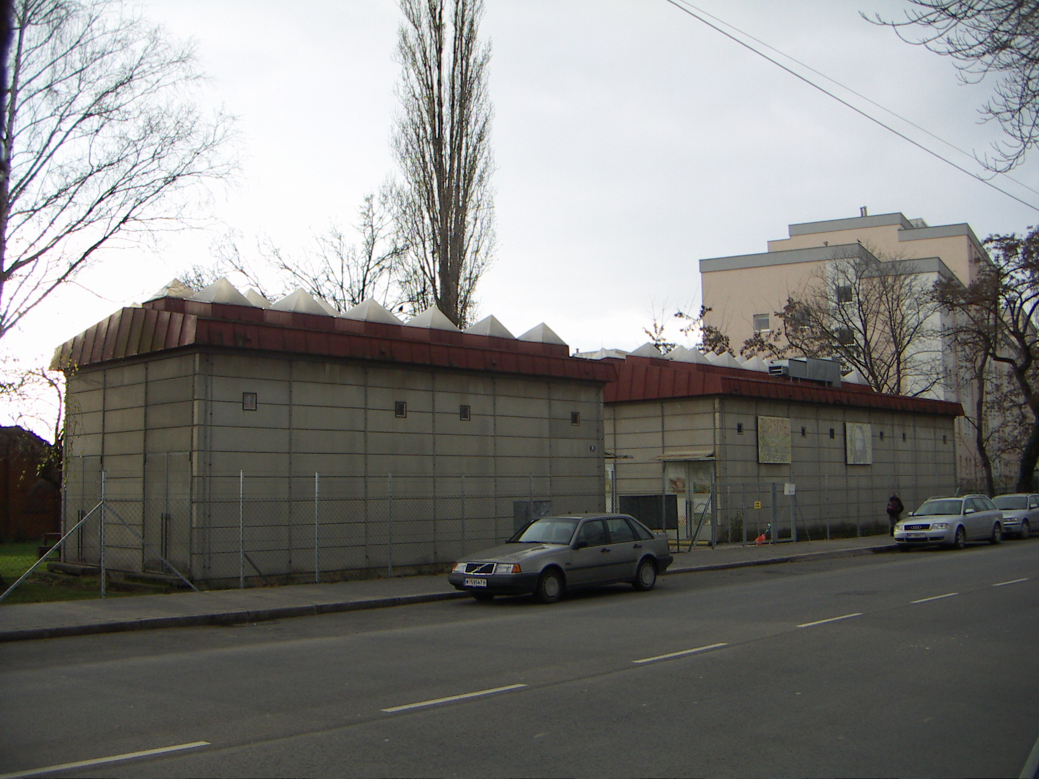 Seelsorgestation St. Rafael, Architekt Ottokar Uhl